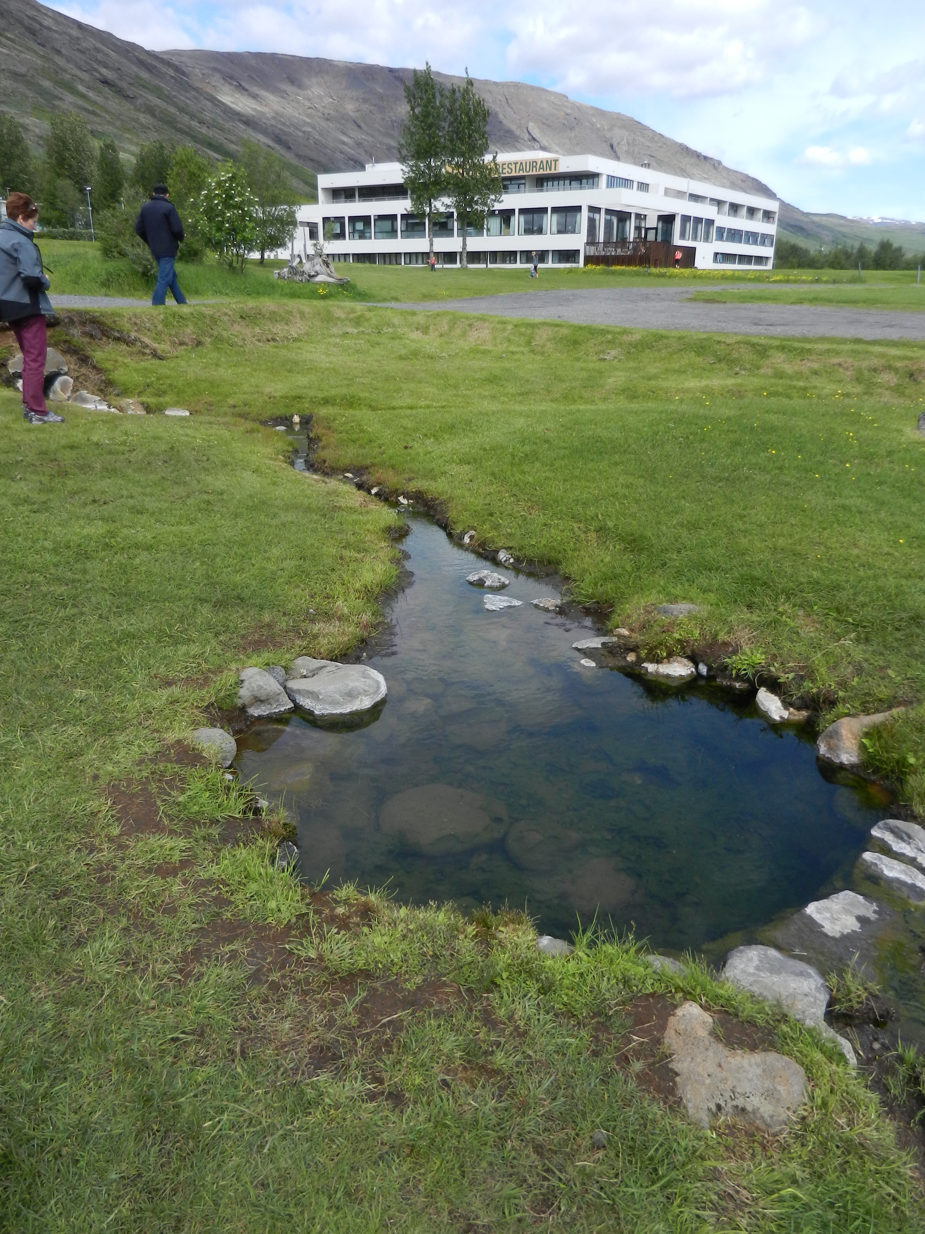 Bazenček ob jezeru Laugarvatn, kjer so krstili prebivalce Islandije.